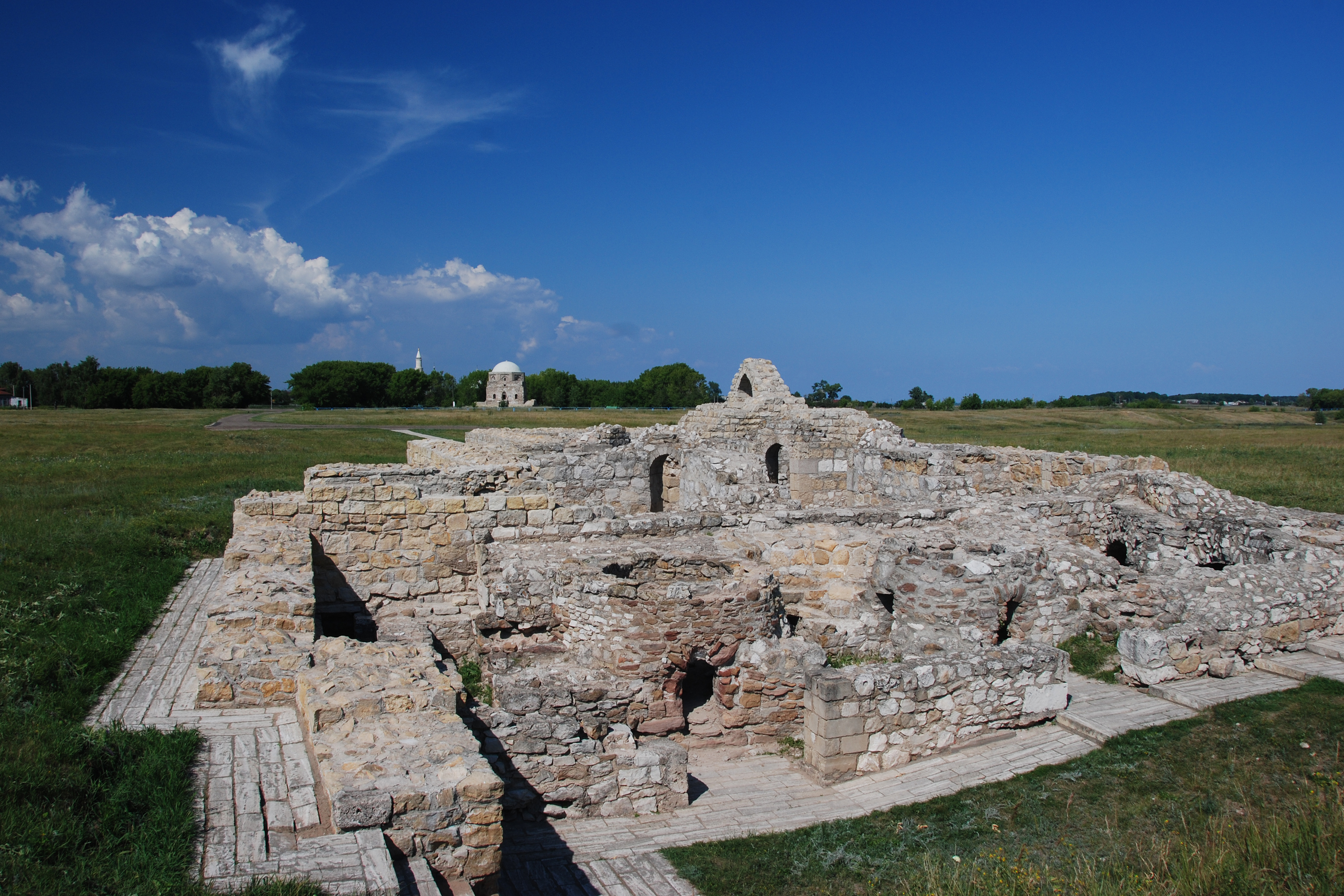 Комплекс памятников архитектуры XIII-XIV вв. на территории Булгарского городища (архитектурный комплекс «Болгары») (Республика Татарстан, Болгар, село Болгары, городище)